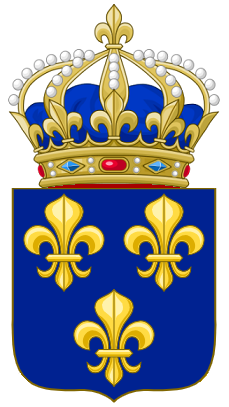 Escudo tradicionalista